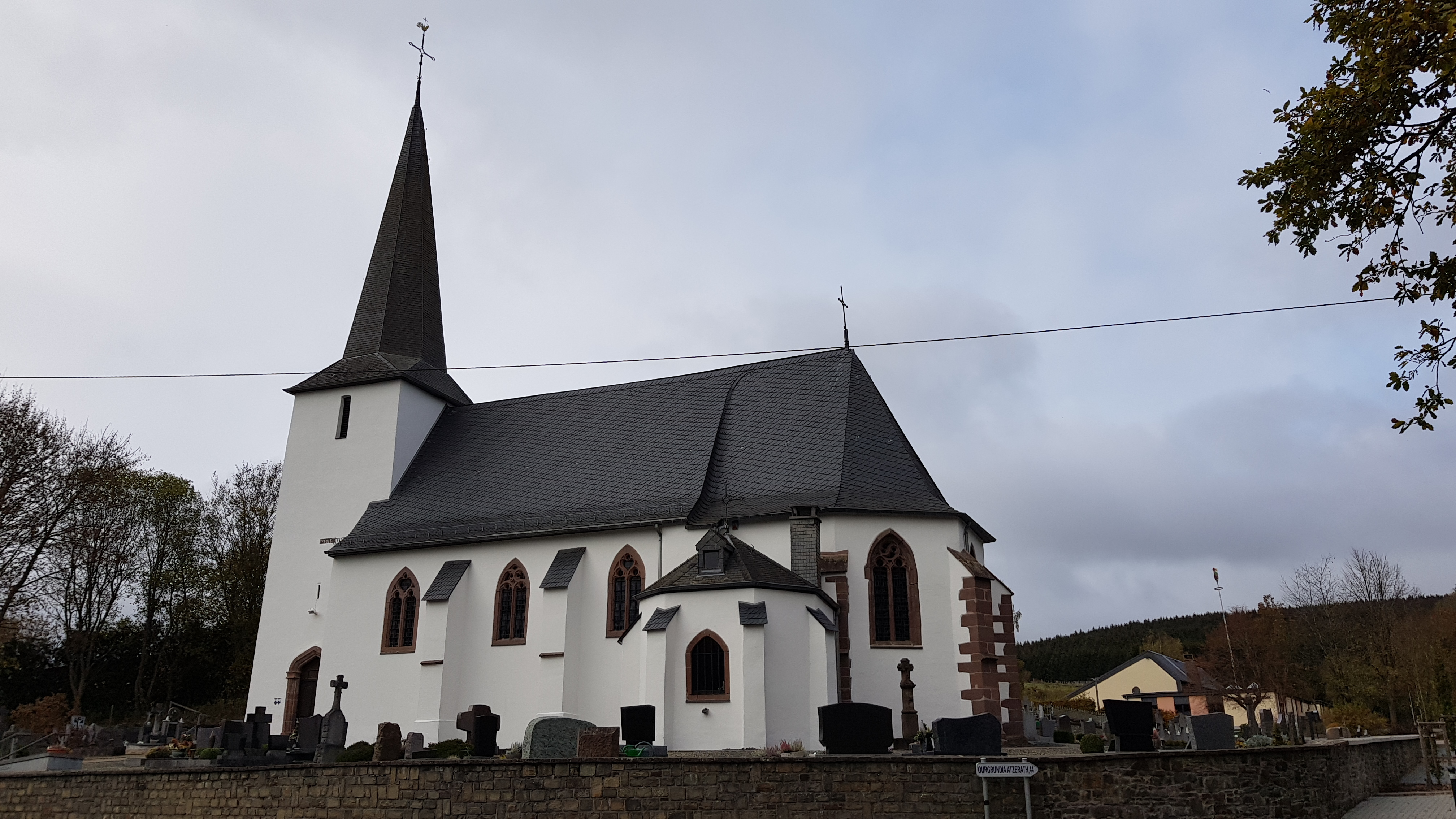 Kirche St. Laurentius, Mackenbach, Sankt Vith, Belgien This photo of immovable heritage has been taken in the Walloon Region